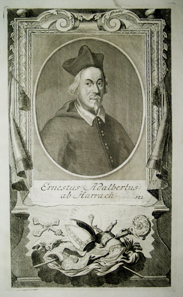 Ernst Adalbert Graf von Harrach (1598 - 1667): Ernestus Adalbertus ab Harrach. Erzbischof von Prag; Kardinal; Bischof von Trient; Reorganisator der katholischen Kirche Böhmens.